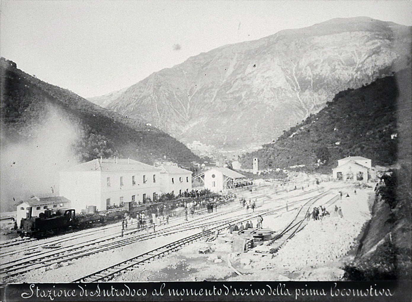 Arrivo della prima locomotiva alla stazione di Antrodoco-Borgo Velino. Immagine tratta dalla raccolta di fotografie sulla costruenda ferrovia Terni-Rieti-L'Aquila, realizzata da Achille Mauri per conto della "Società Italiana per le strade ferrate meridionali" e pubblicata nell'ottobre 1883.